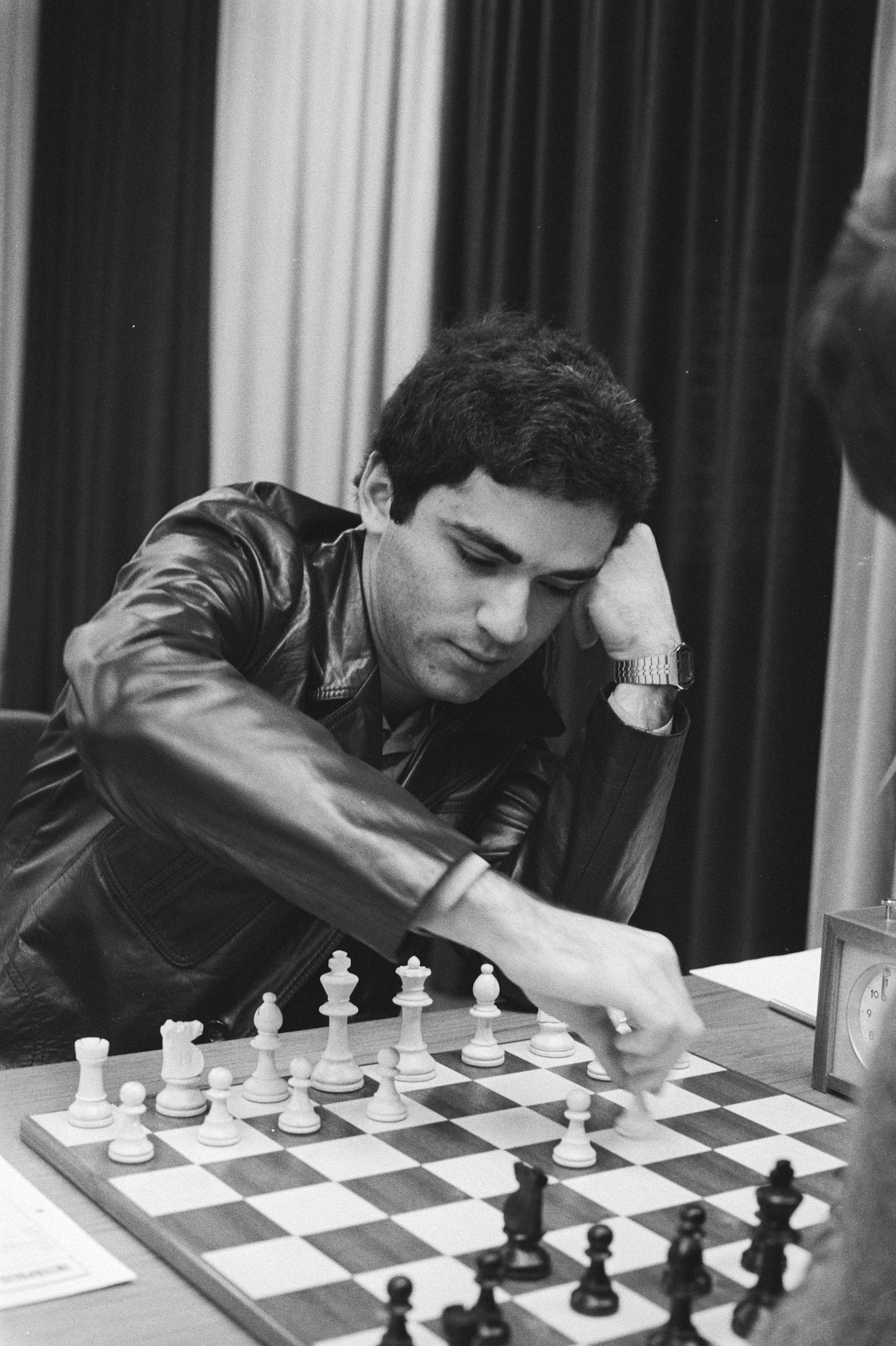 Collectie / Archief : Fotocollectie Anefo Reportage / Serie : Interpolis Schaaktoernooi in Tilburg Beschrijving : De 18-jarige Rus Garri Kasparov aan zet Datum : 2 oktober 1981 Locatie : Noord-Brabant, Tilburg Trefwoorden : portretten, schaken, sport, wedstrijden Persoonsnaam : Kasparov, Garri Fotograaf : Antonisse, Marcel / Anefo Auteursrechthebbende : Nationaal Archief Materiaalsoort : Negatief (zwart/wit) Nummer archiefinventaris : bekijk toegang 2.24.01.05 Bestanddeelnummer : 931-7203